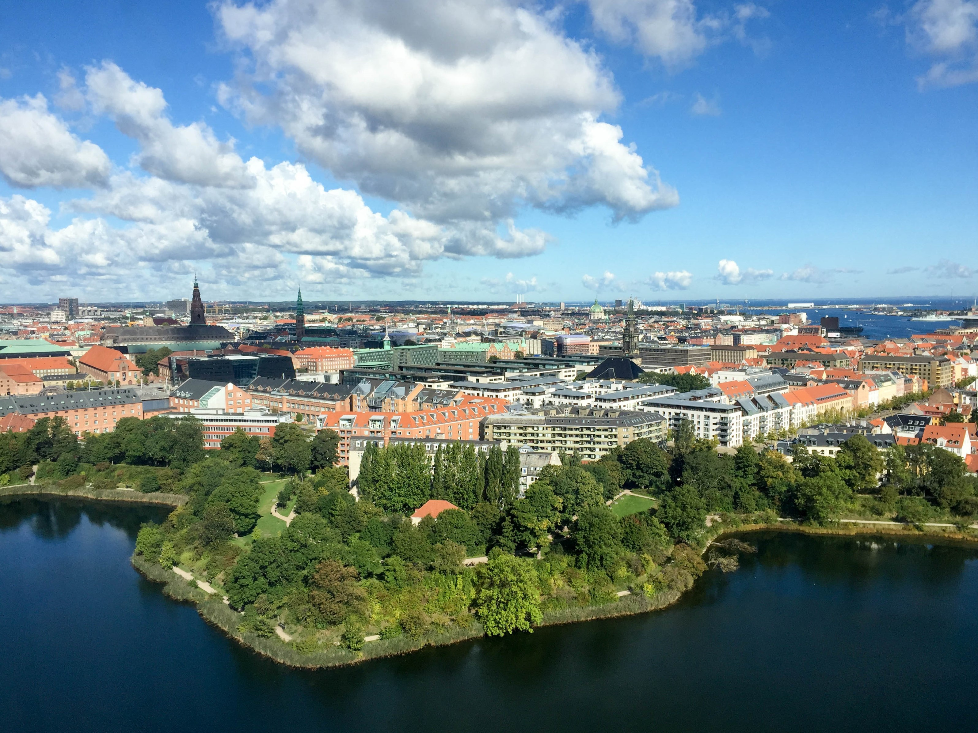 Enhjørningens Bastion in Copenhagen, Denmark2015